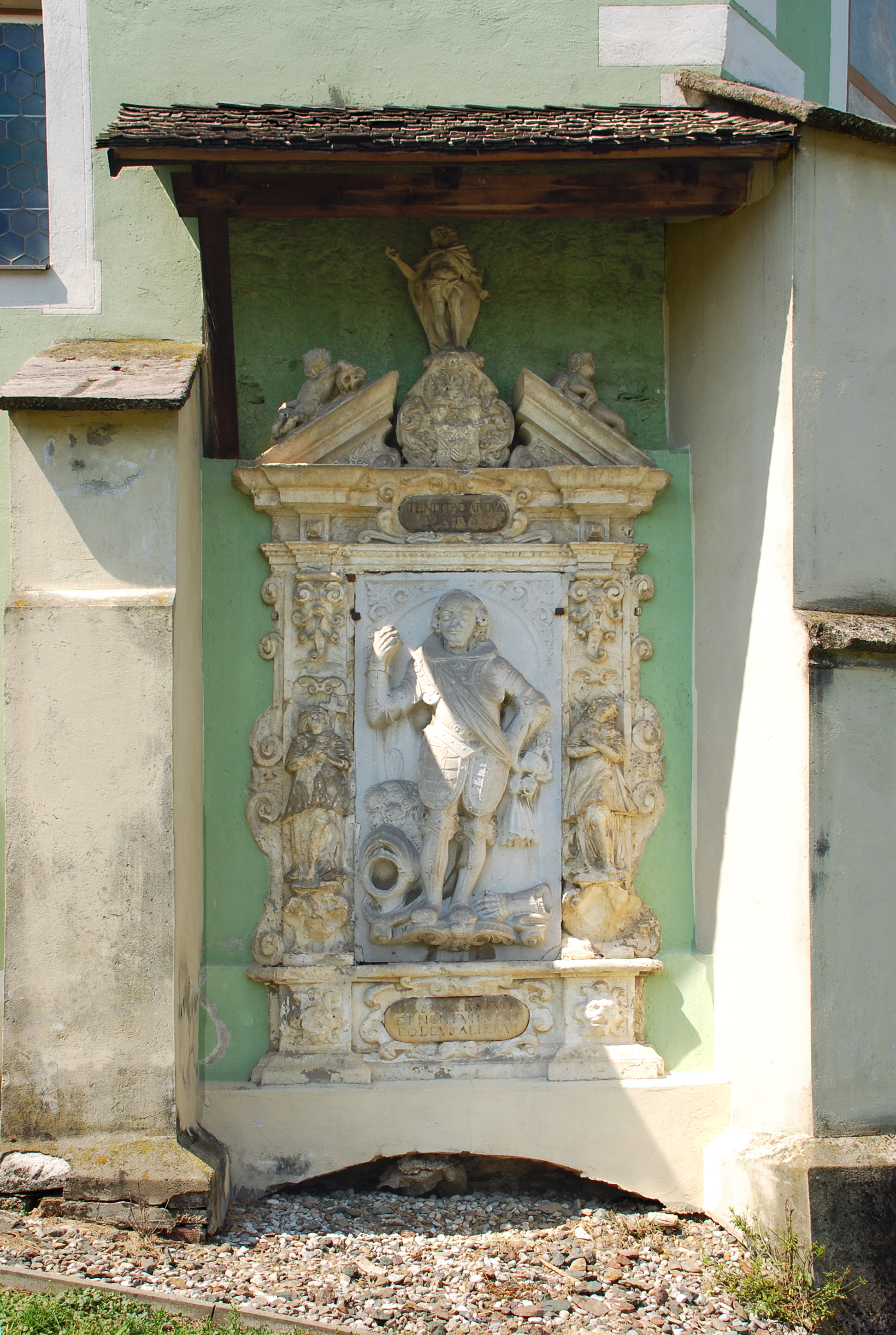 Filialkirche St Ulrich, Hörbing, Deutschlandsberg, Standbild an der Südostseite: Figur des Johann Freiherr von Meylegg, gest. 1626. Object location46° 48′ 49.02″ N, 15° 14′ 26.86″ E